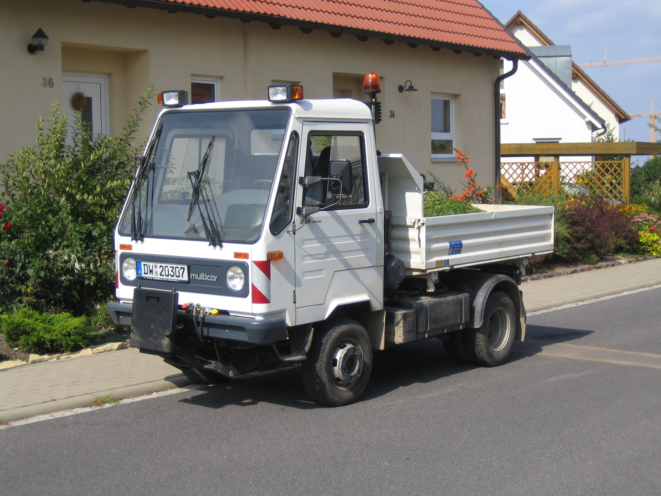 Multicar M 26 Profi Line